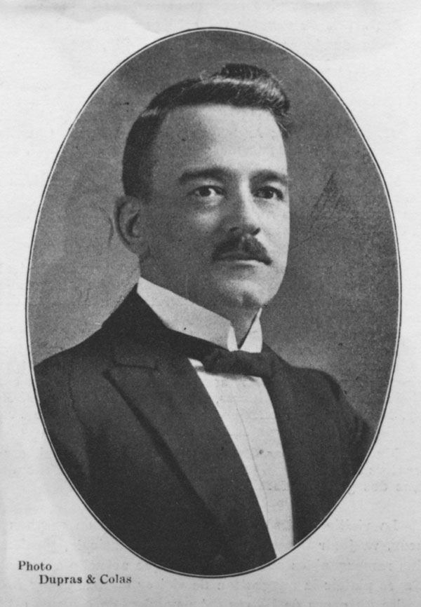 Portrait of Pierre-Aurèle Asselin